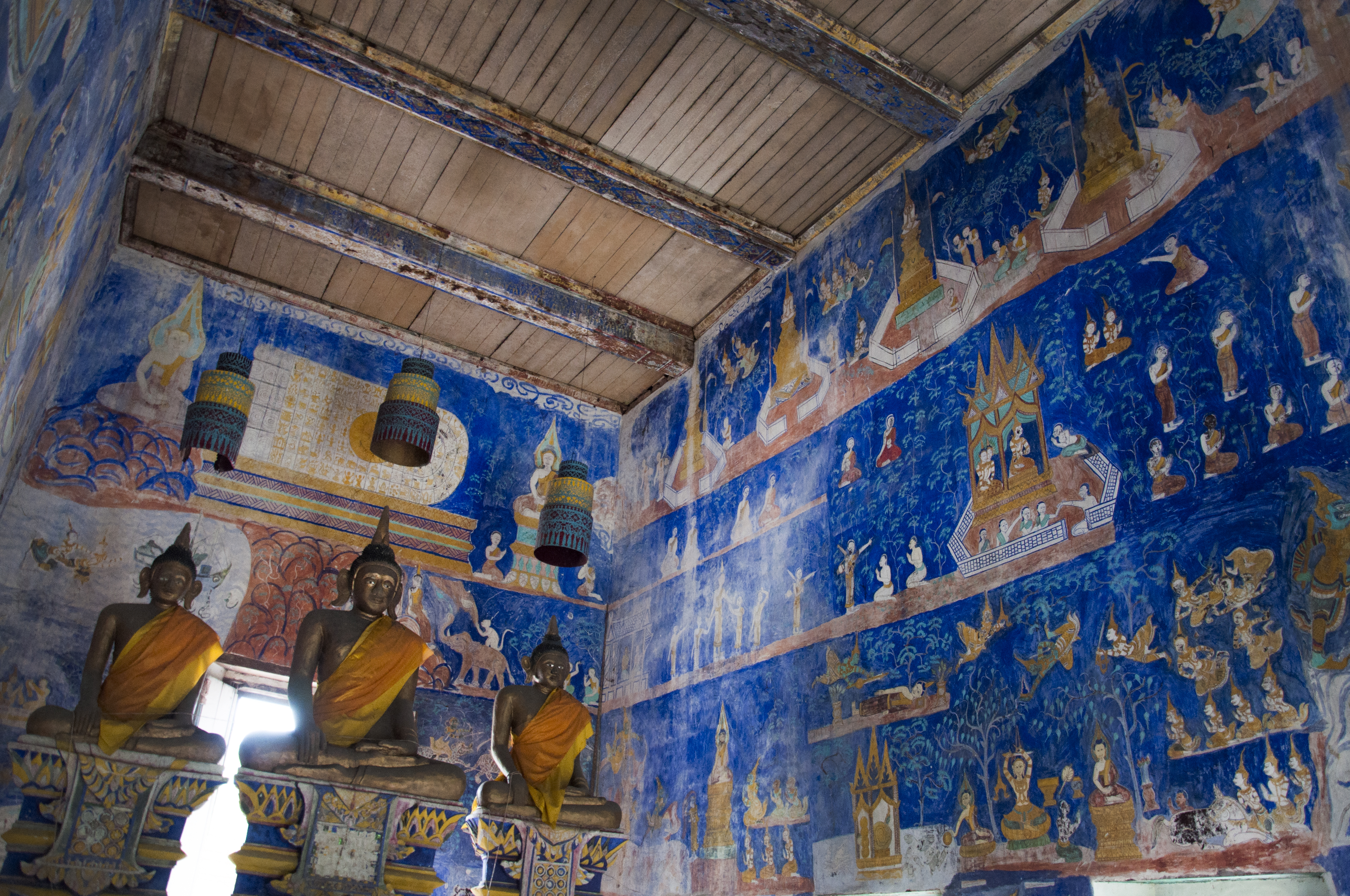 วัดเทพนิมิต